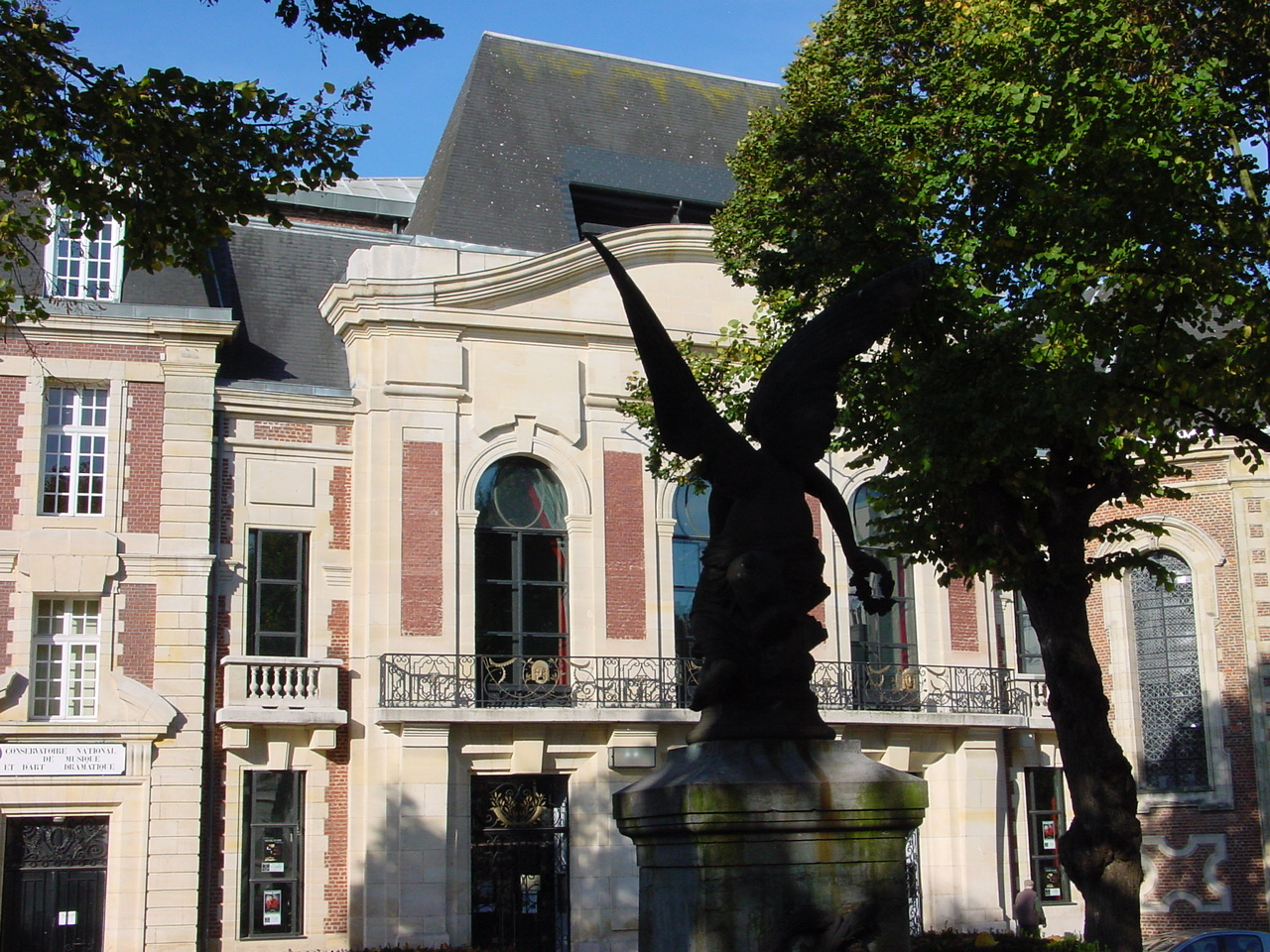 Le théâtre de Cambrai, place Jean-Moulin, encadré par le Conservatoire National de Musique et d'Art Dramatique et par l'ancien hôpital Saint-Julien. Le monument aux morts de la guerre de 1870.